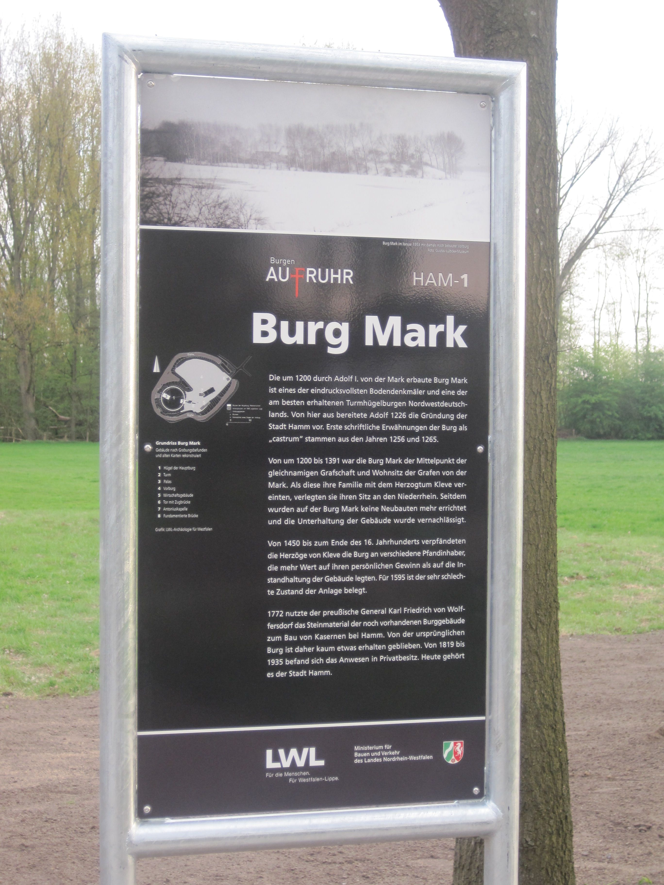 Das Foto zeigt eine neue Informationstafel zum Burghügel in Hamm-Mark an der Soester Straße.